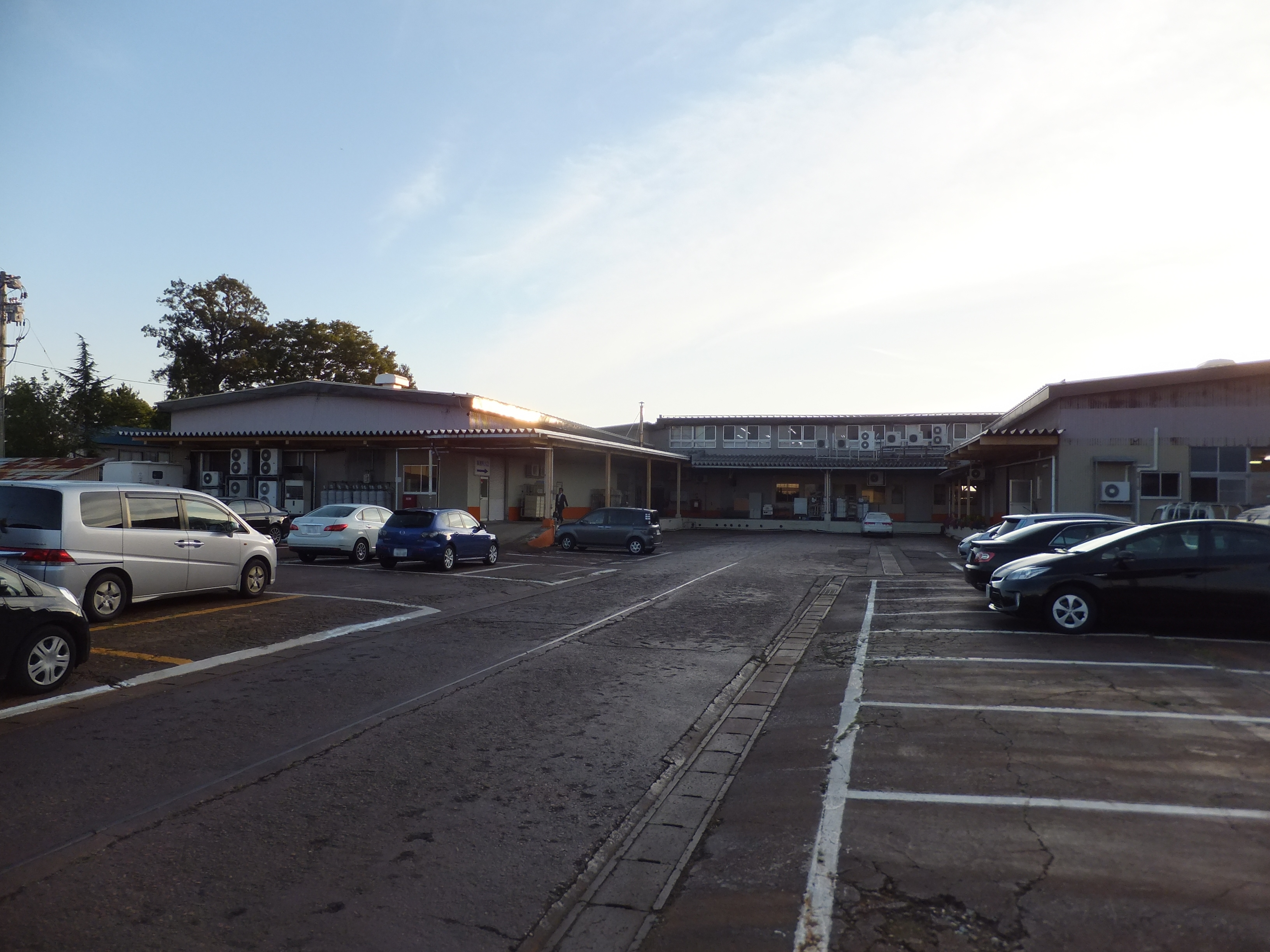 タカヤナギ本社、サービスセンター